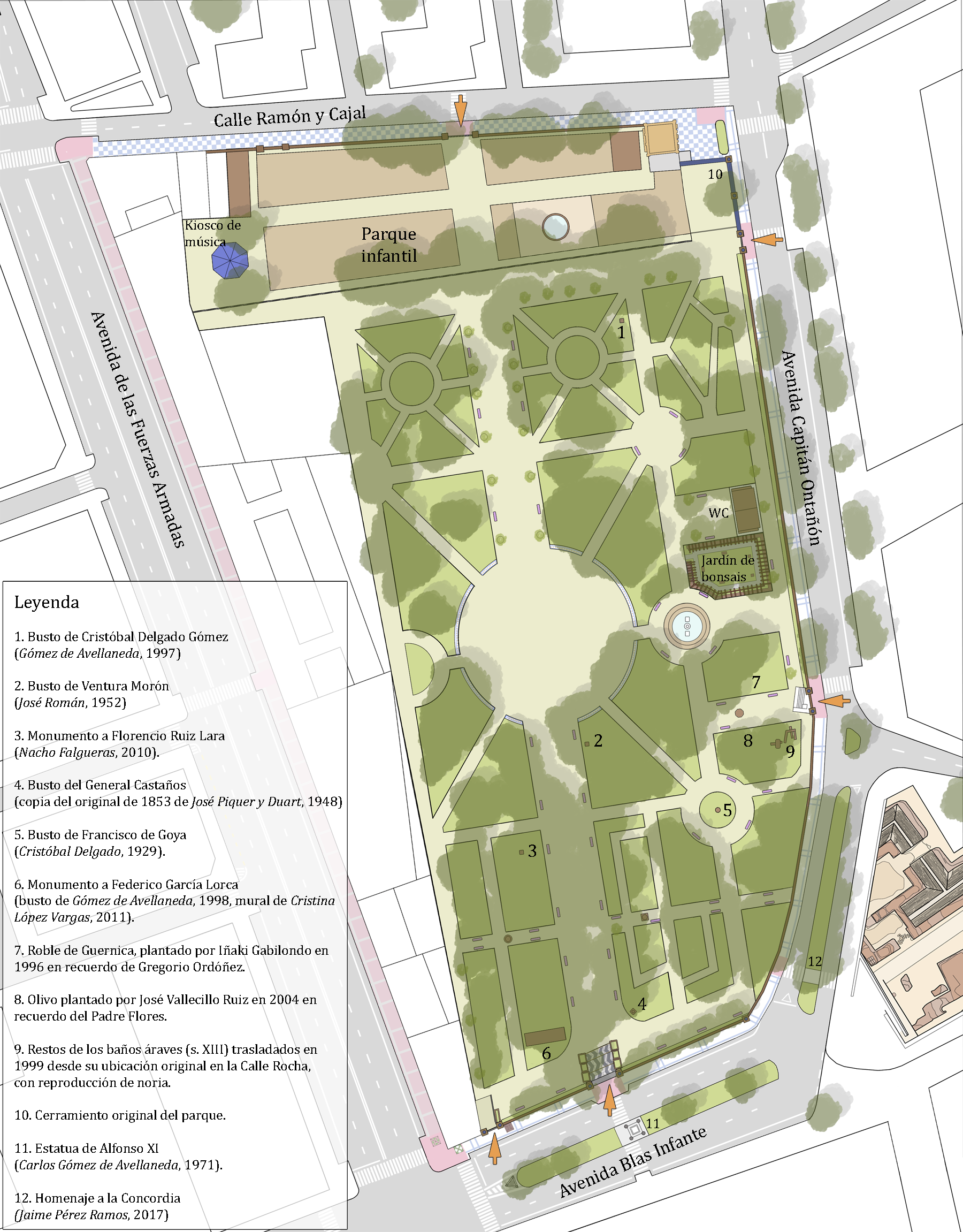 Plano del parque María Cristina de Algeciras (Andalucía, España)